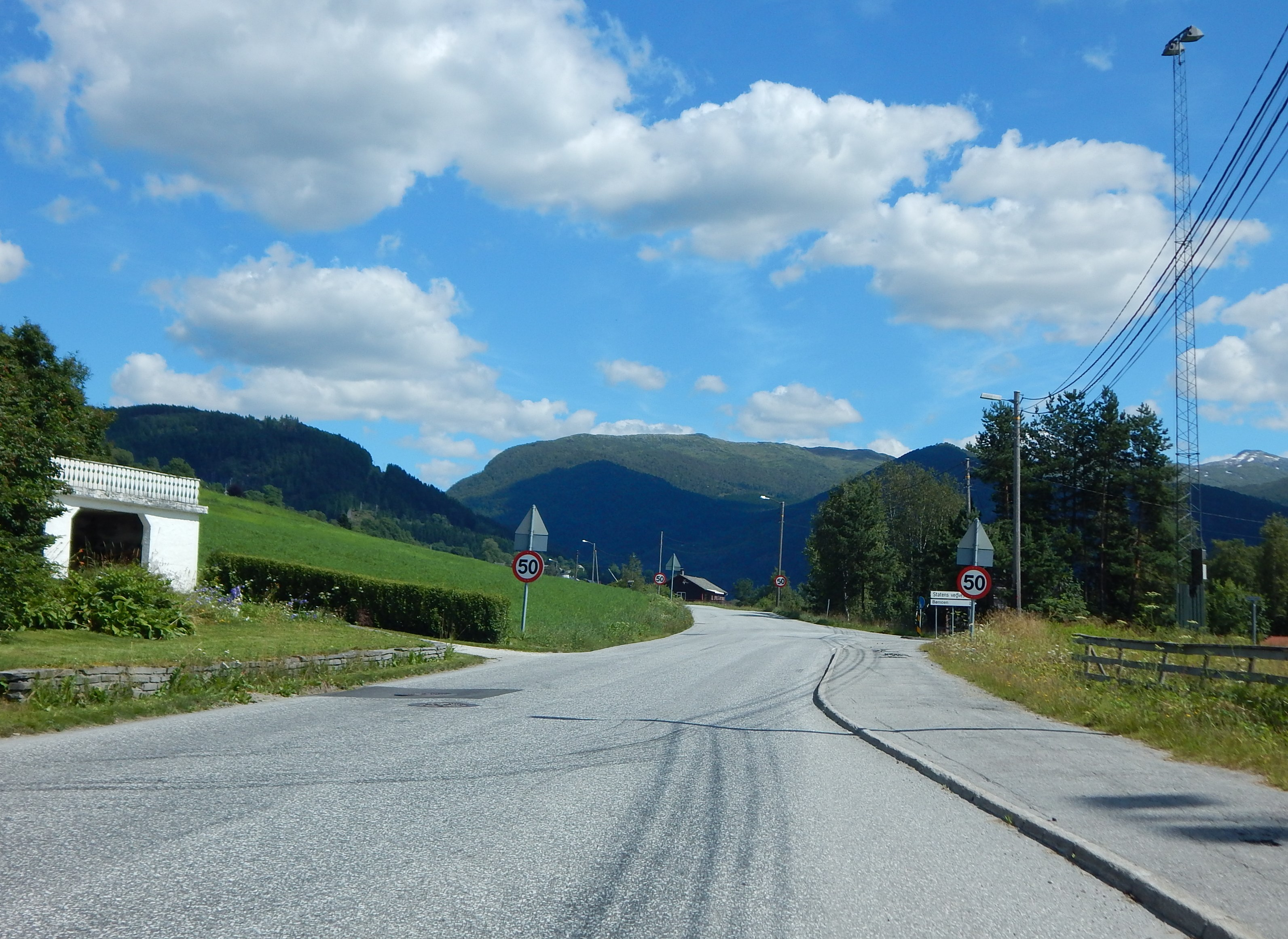 Tjukkebygdvegen (fylkesvei 307)